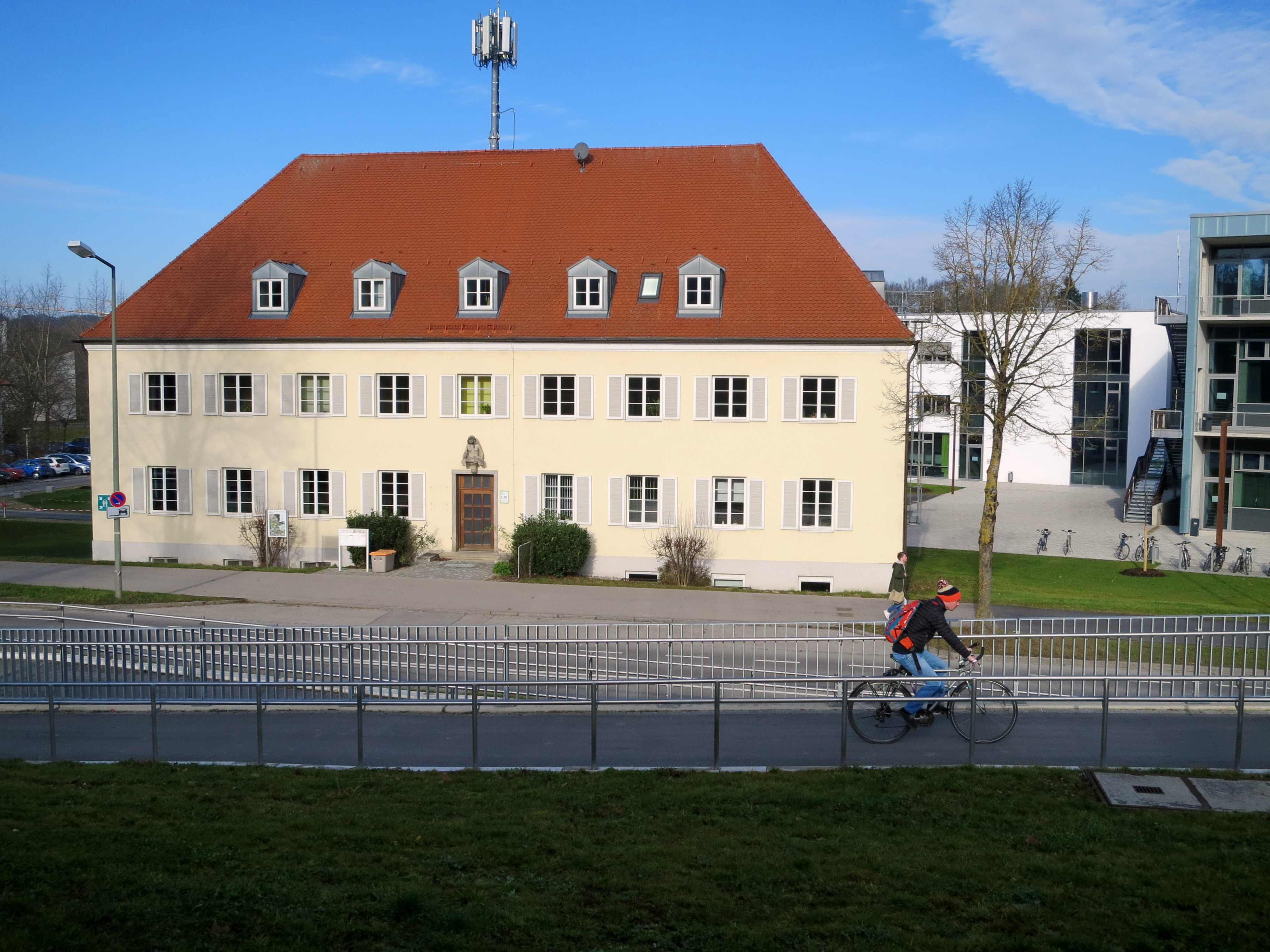 Altes Gebäude der LfL, Verwaltung 01